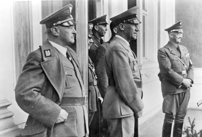 Staatsbesuch des Reichs und Preußischen Ministers des Innern Dr. Wilhelm Frick in Sudetenland